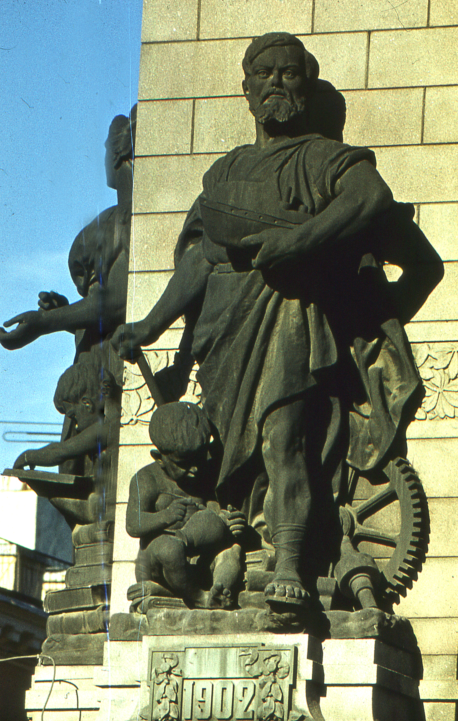 Аллегория промышленности.Фигура на Невском пр.